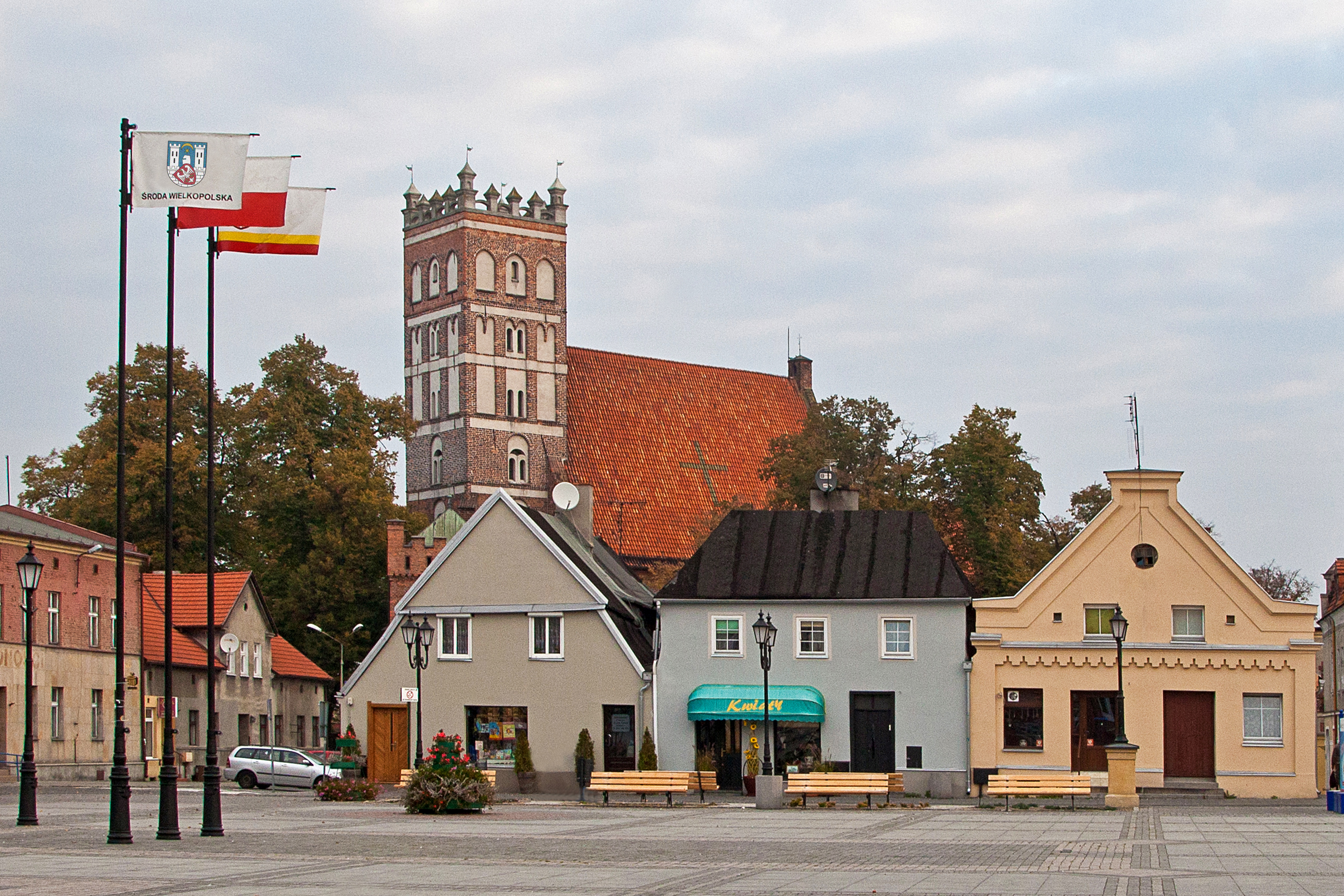 Fragment Starego Rynku w Środzie Wielkopolskiej z najstarszymi zabytkami miasta - kamieniczkami senatorskimi i farą pw. Wniebowzięcia Najświętszej Maryi Panny